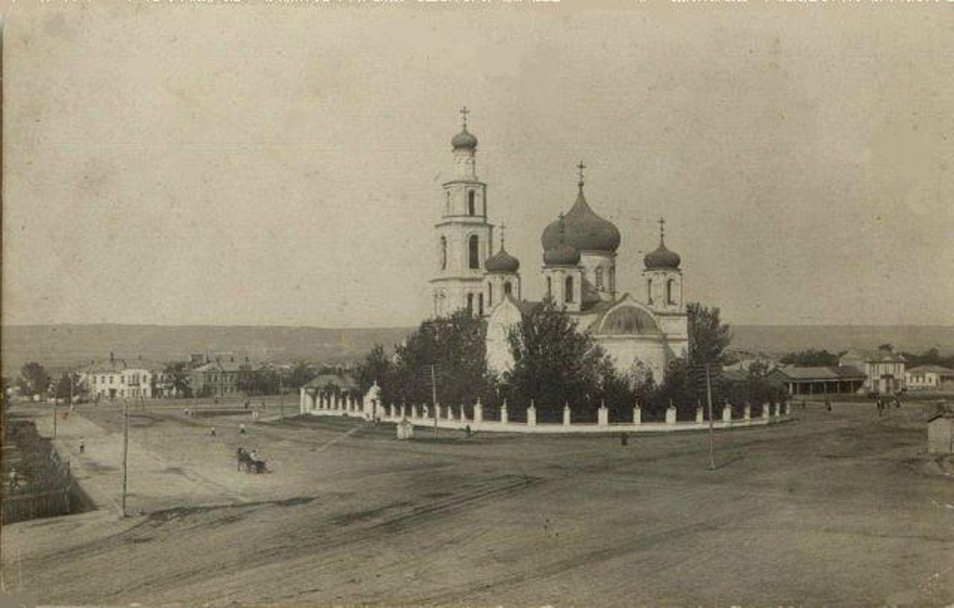 Фотография начала 20-го века. Разрушенный в 1932 году Валуйский Владимирский собор. Был построен в 1843-1853 годах на средства прихожан (это предприятие обошлось им в сумму до 30-ти тысяч рублей). Трехпрестольный храм в византийском вкусе.